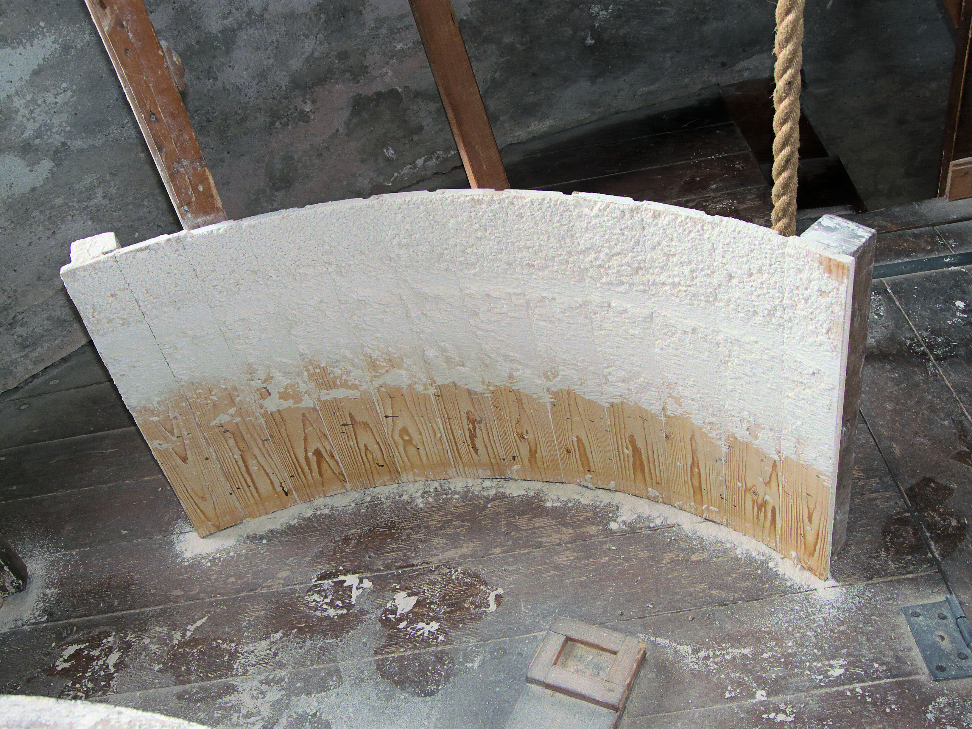 De Hoop Garderen maalkuipdeel met aanhangend tarwemeel